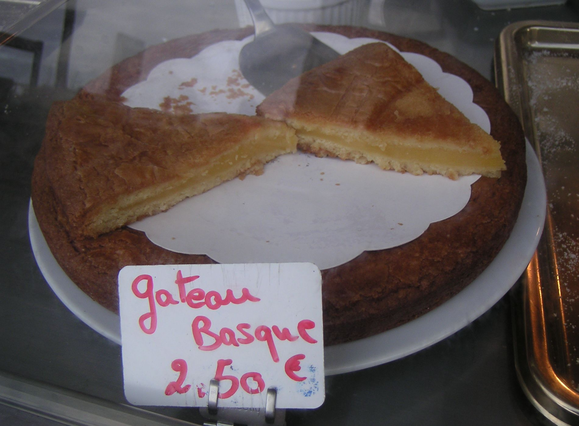 El pastís basc és una mena de tarta que pot recordar una mica la tarta de santiago de Galícia i que sol estar farcida de crema, de cireres o de melmelada de cireres.